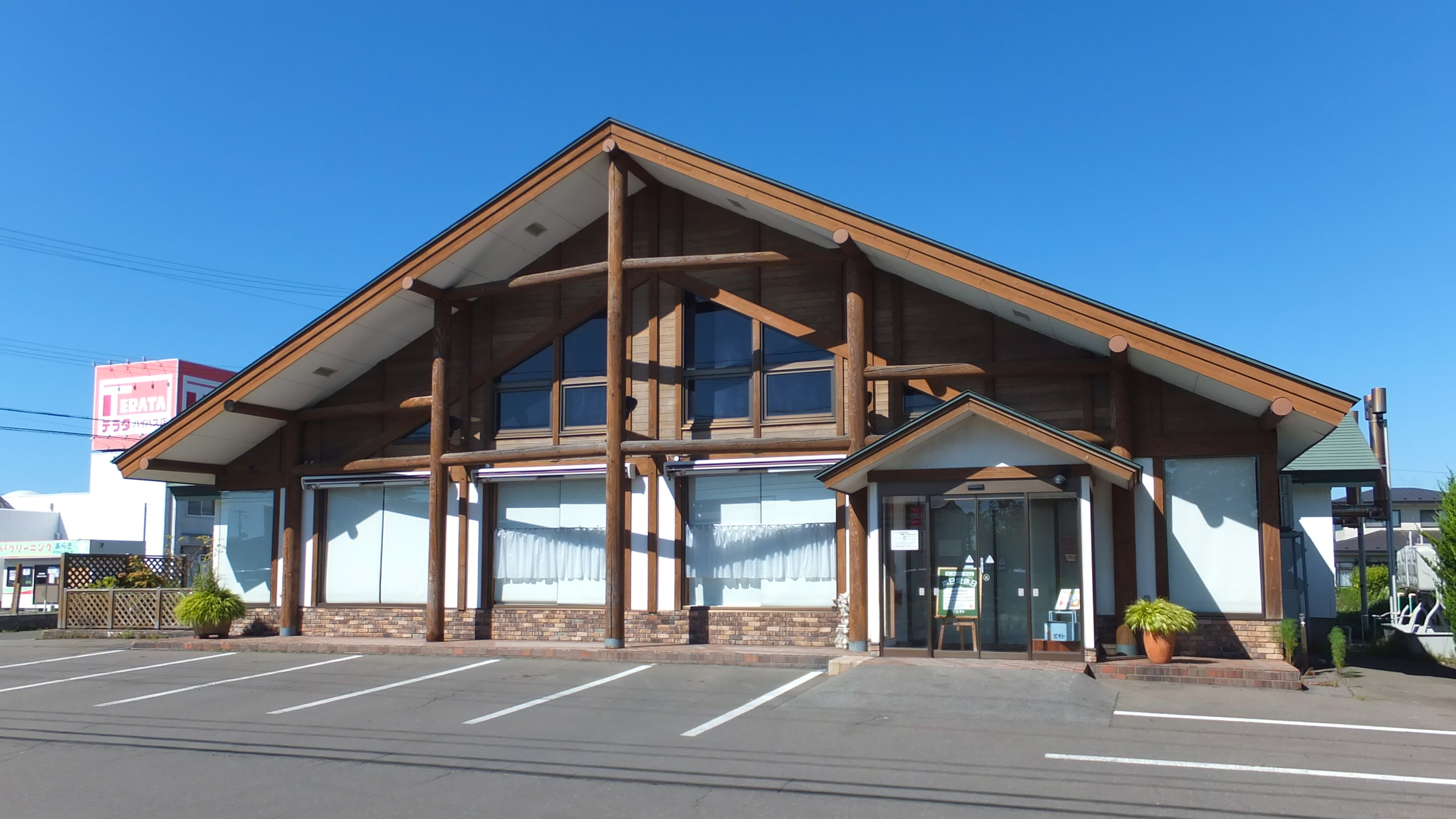 能代市の菓子舗「セキト」のバイパス店